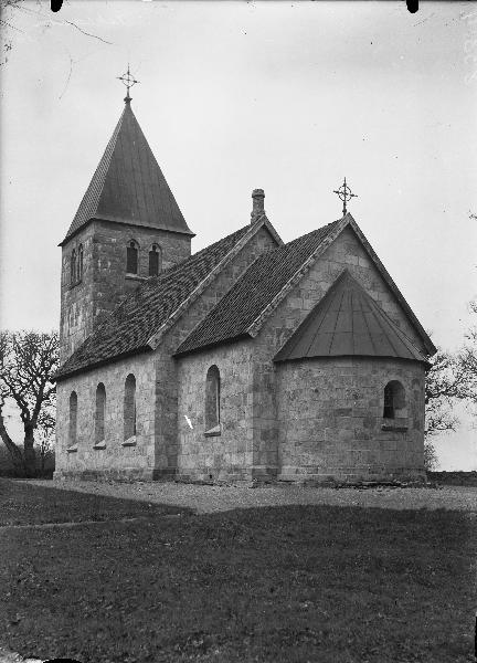 Kyrkan från sydöst.